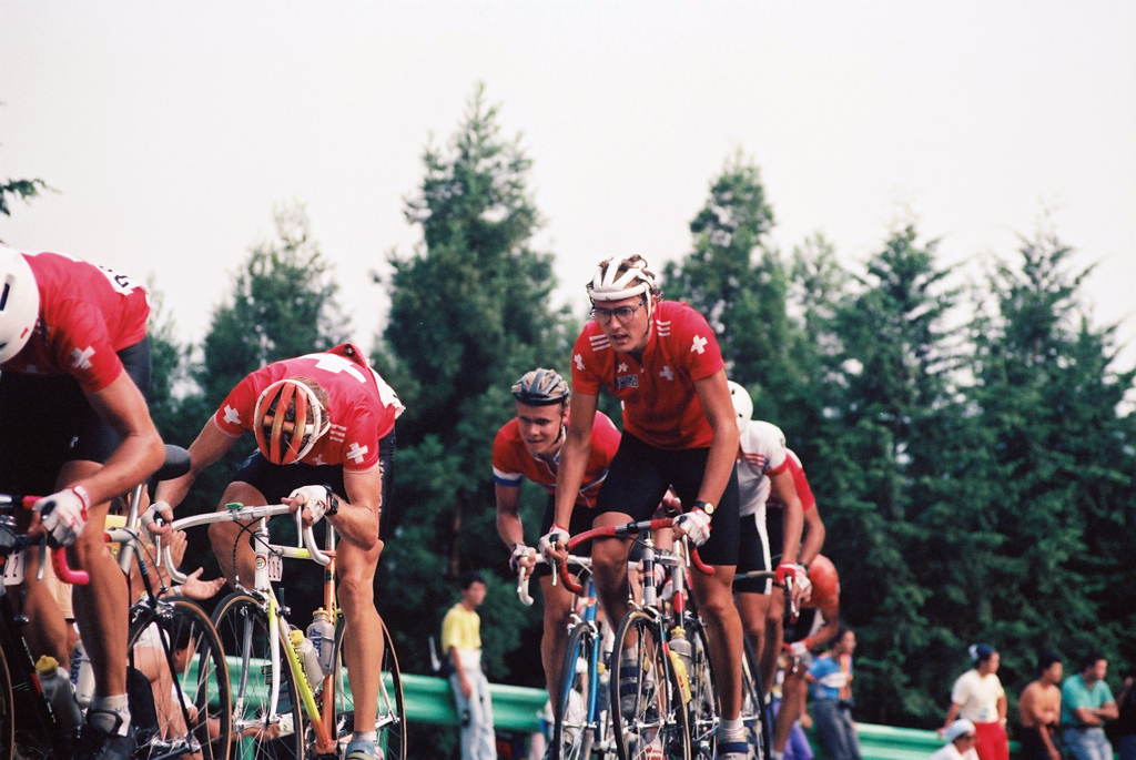 Armin Meier, Roland Meier et Alex Zülle, lors de la course en ligne amateur des championnats du monde de cyclisme de 1990